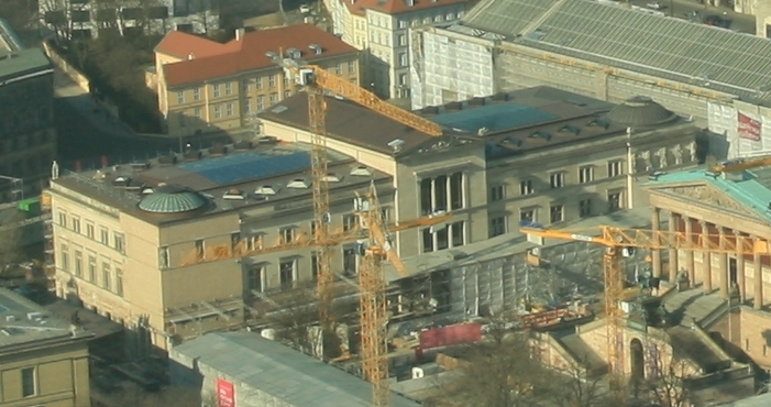 Neues Museum vom Fernsehturm aus fotografiert